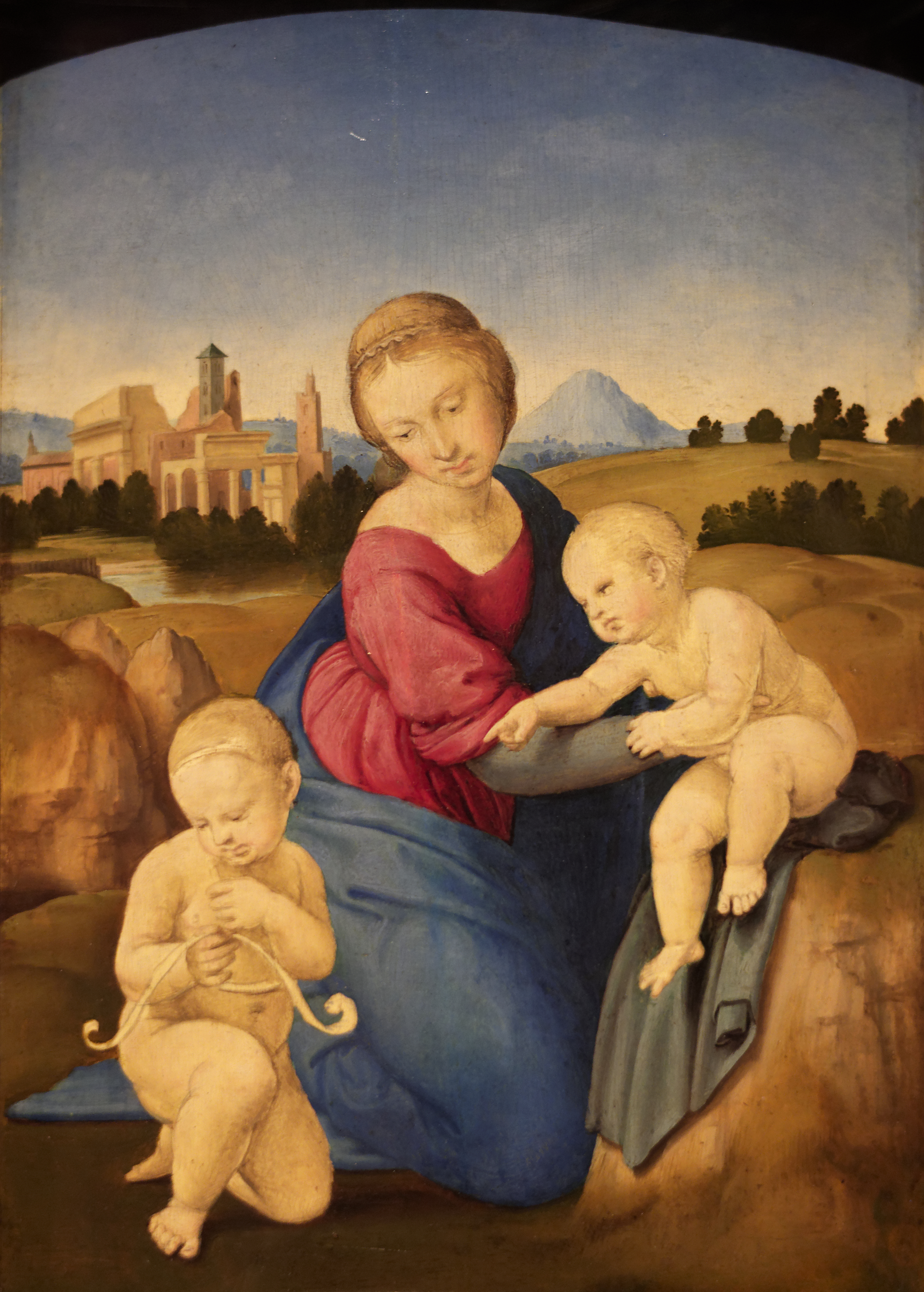 La Madone Esterházy, Raphaël (c 1508). Huile sur toile exposée au musée des Beaux Arts de Budapest. Inv.Nr 71